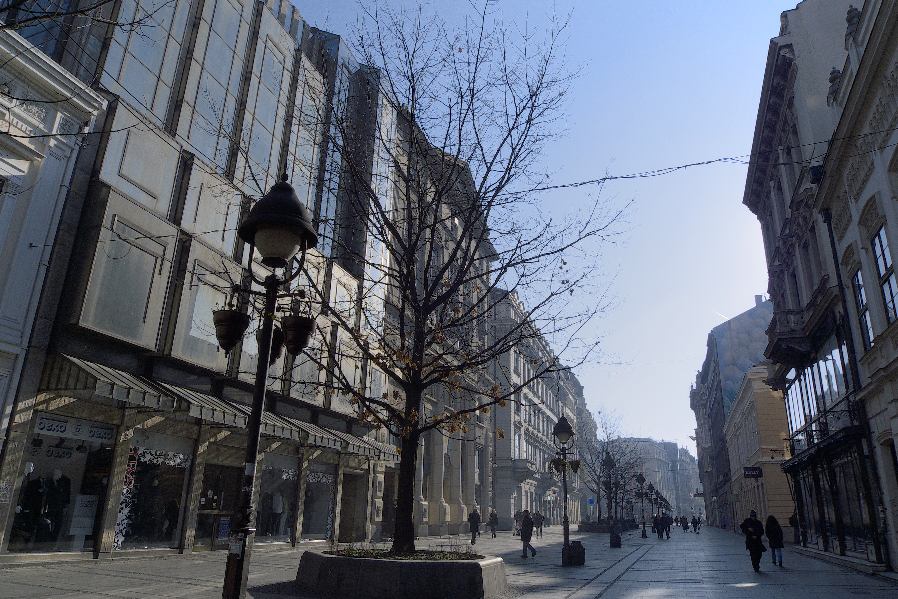 Prince Michael Street (Knez Mihajlova)